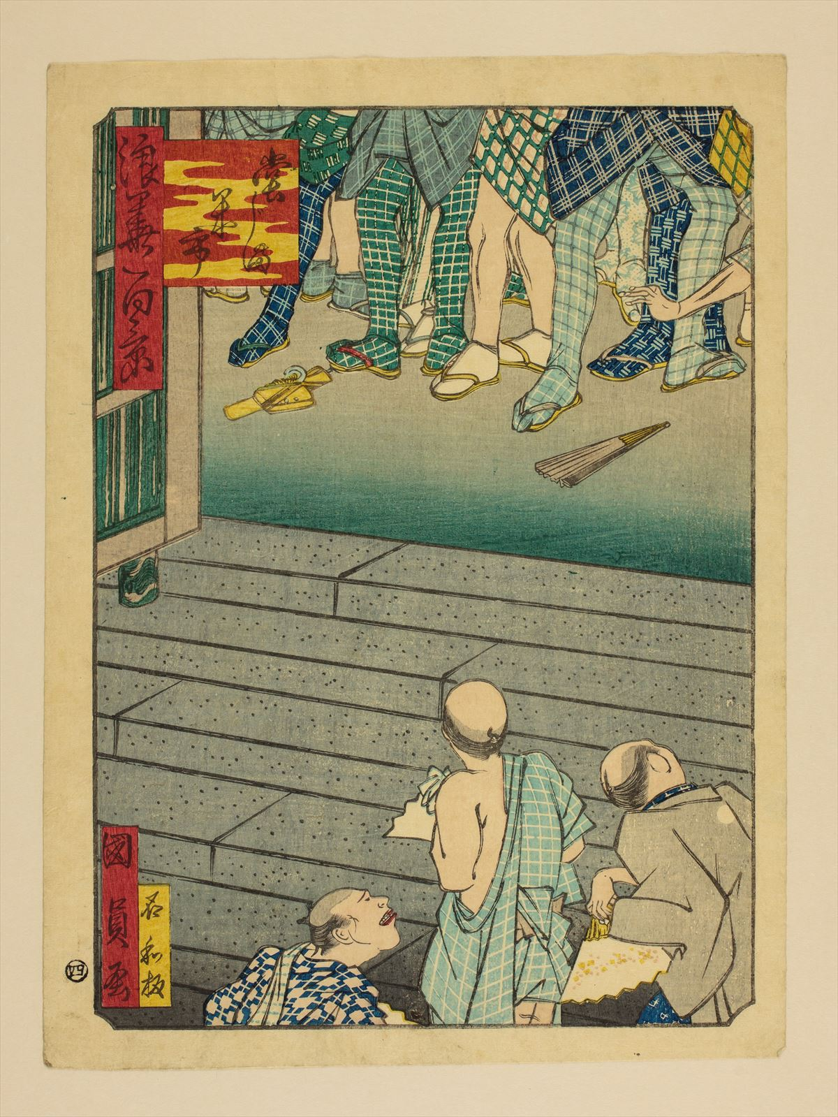 1800年代。歌川國員/画。浪花百景 102枚のうちの1枚。大阪市立中央図書館蔵。